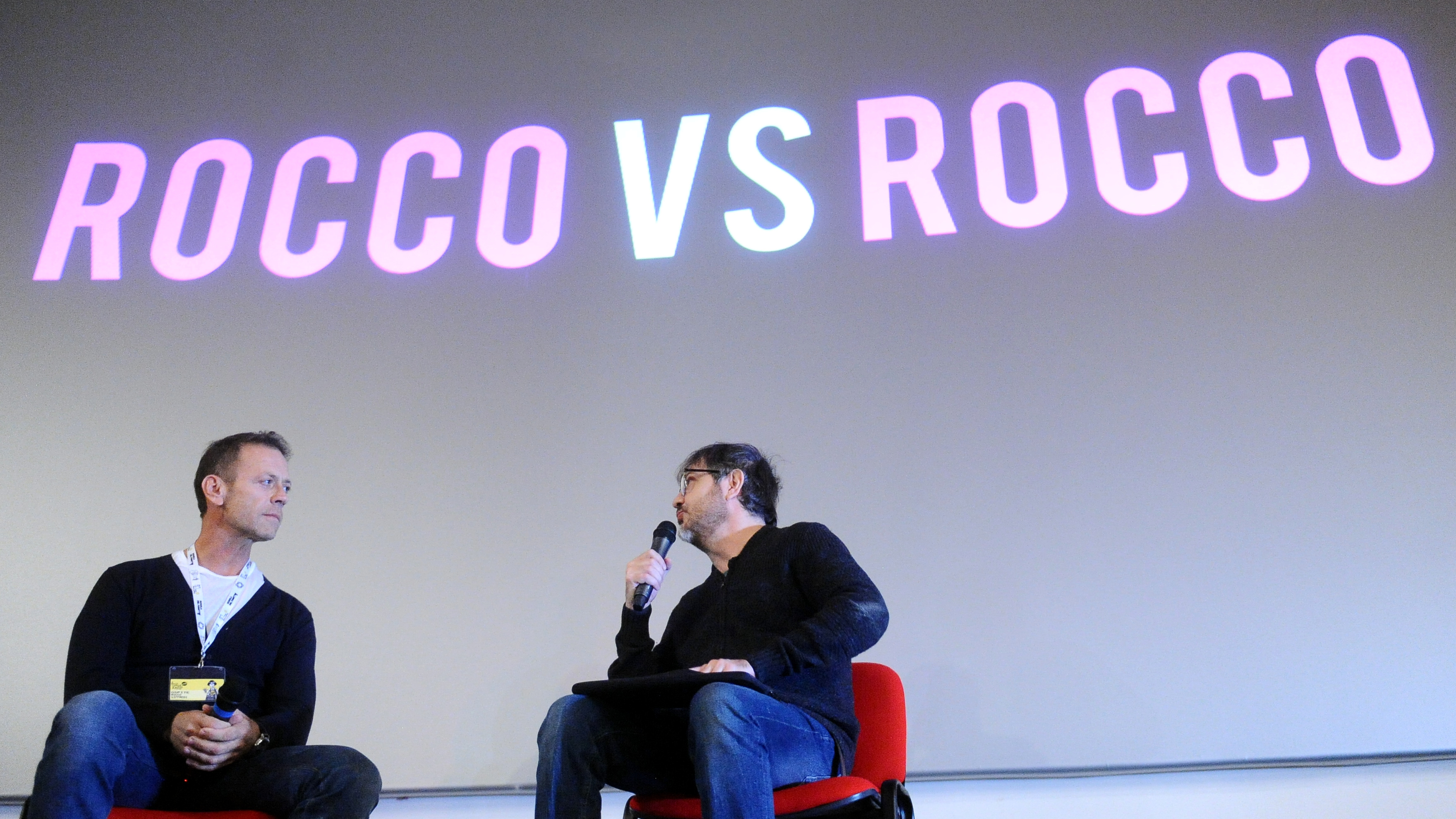 Rocco Siffredi e Rocco Tanica a Lucca Comics & Games 2016. Incontro "Rocco vs Rocco" al Cinema Astra.